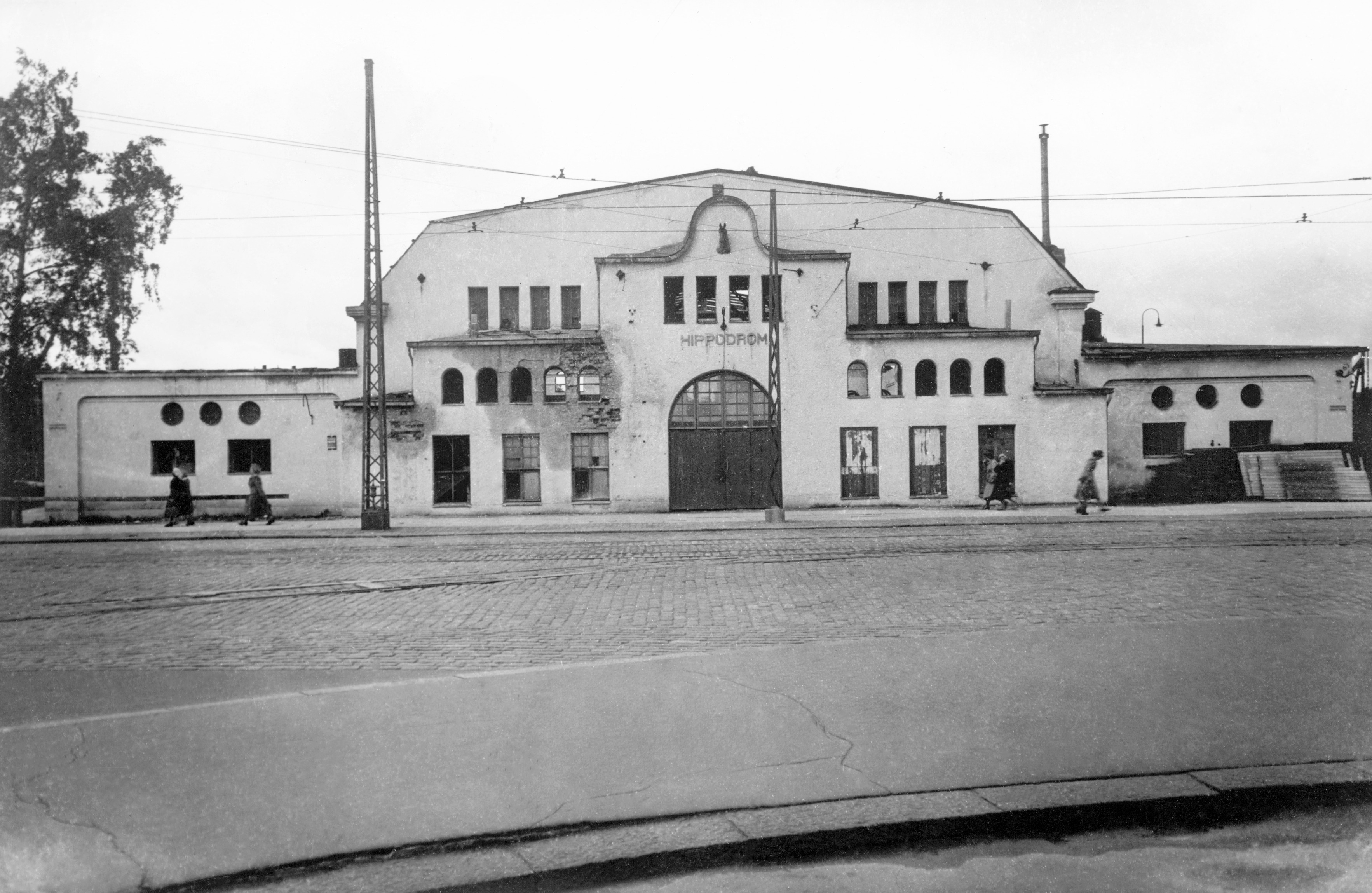 Rakennuksen suunnitteli K. A. Andersson, ja se valmistui 1910. Hippodromissa oli tallitilaa 40 hevoselle, ja katsomoon mahtui 1000 katsojaa. Hippodromilla järjestettiin joka syksy sirkusesityksiä. Lisäksi siellä järjestettiin painikilpailuja ja Suomen ensimmäiset viralliset nyrkkeilykisat. Hippodromin paikalle rakennettiin 1950 Messuhallin B-halli, nk. Pikku-Messuhalli.